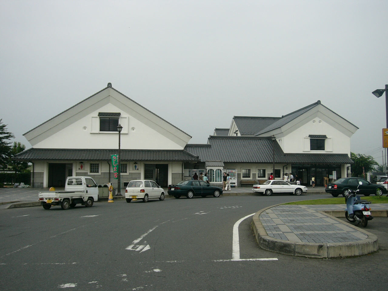 Michinoeki Sakai (Ibaraki) (道の駅さかい)